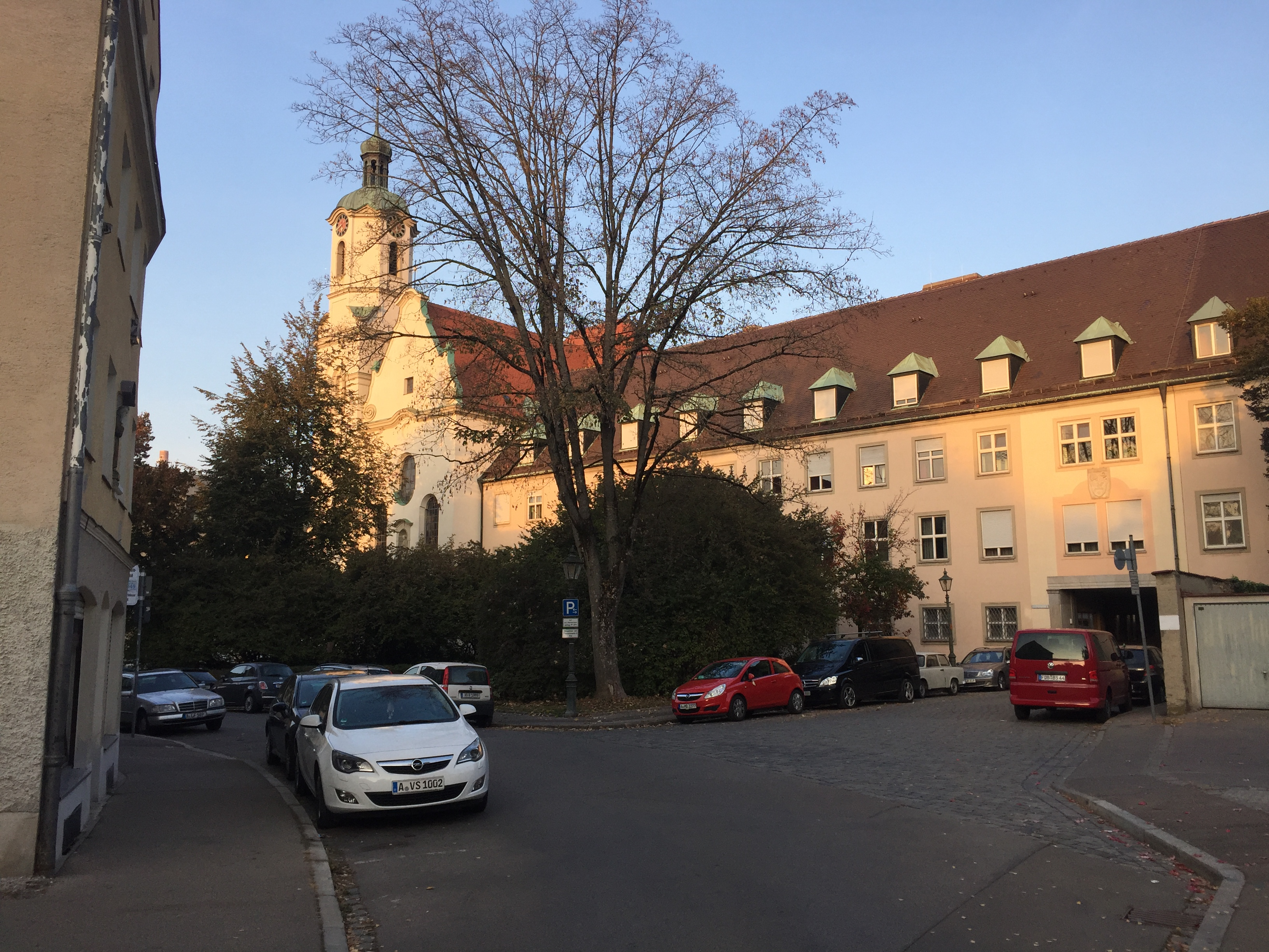 Die Kirche St. Stephan in Augsburg